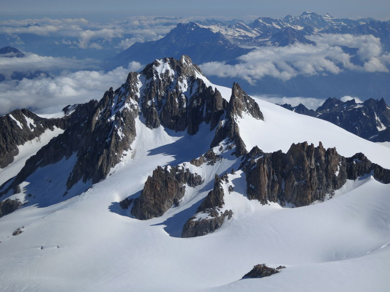 L'aiguille du Tour vue depuis l'aiguille du Chardonnet